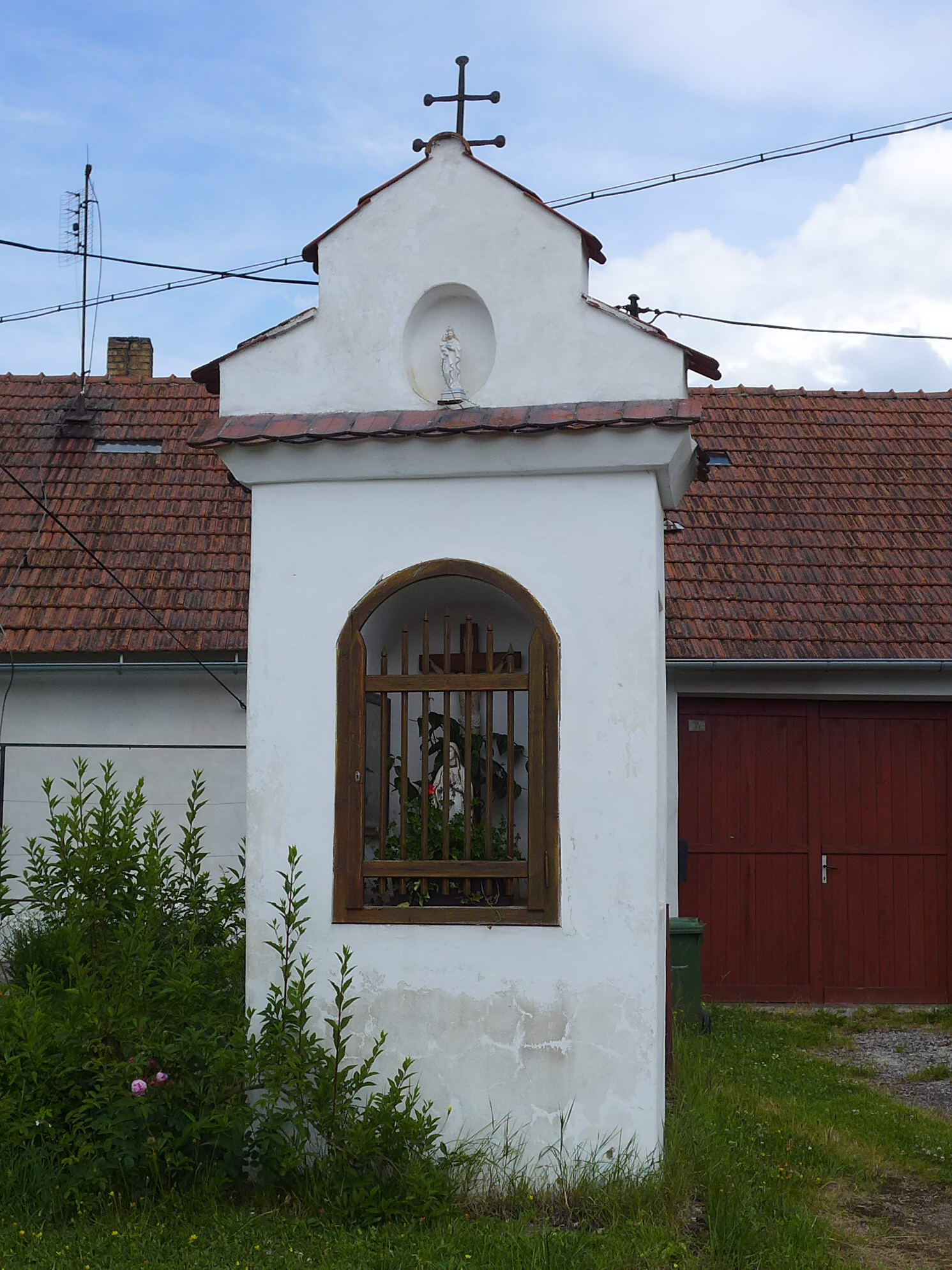 Výklenková kaplička - poklona (Svojkovice), náves, Svojkovice